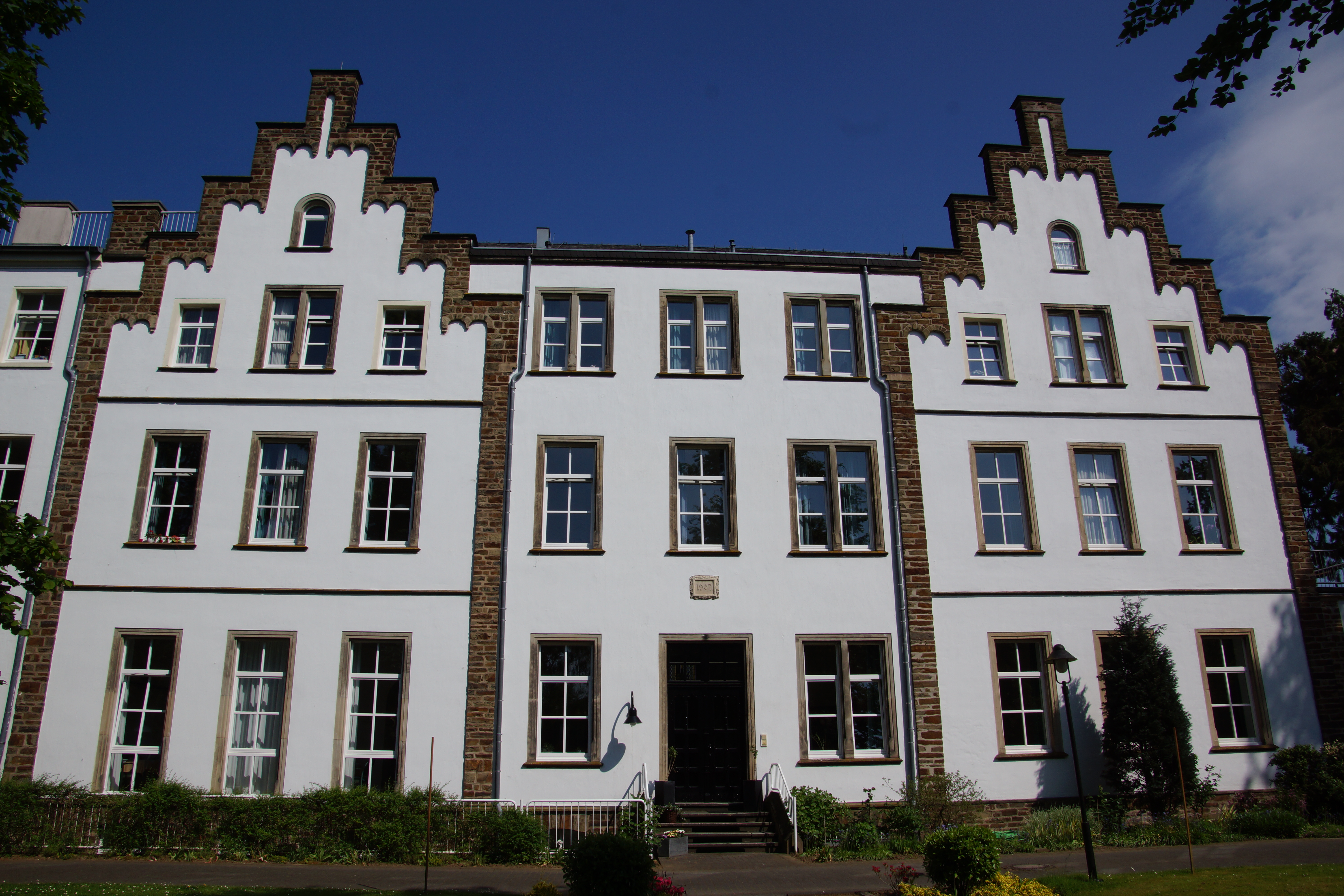 Christinenstift in Unkel, Rheinseite, Kirchstraße 12